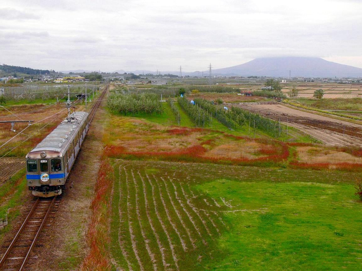 弘南鉄道大鰐線を走る6000系電車。 津軽大沢～松木平の駅間にて撮影。